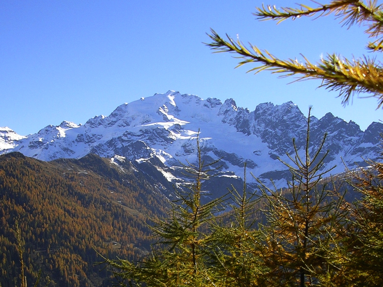 Cima Piazzi in autunno